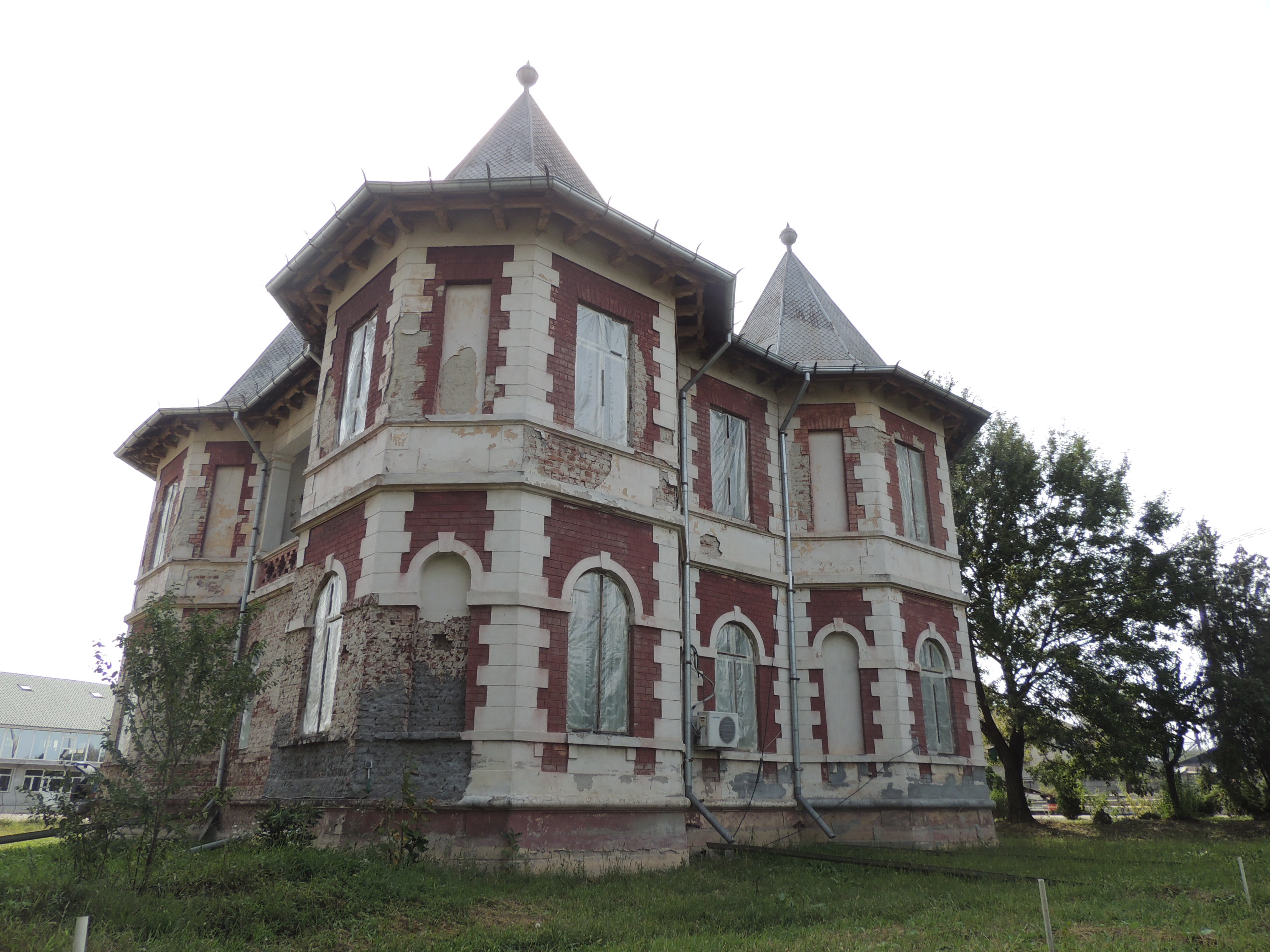 Vedere Nord-Est